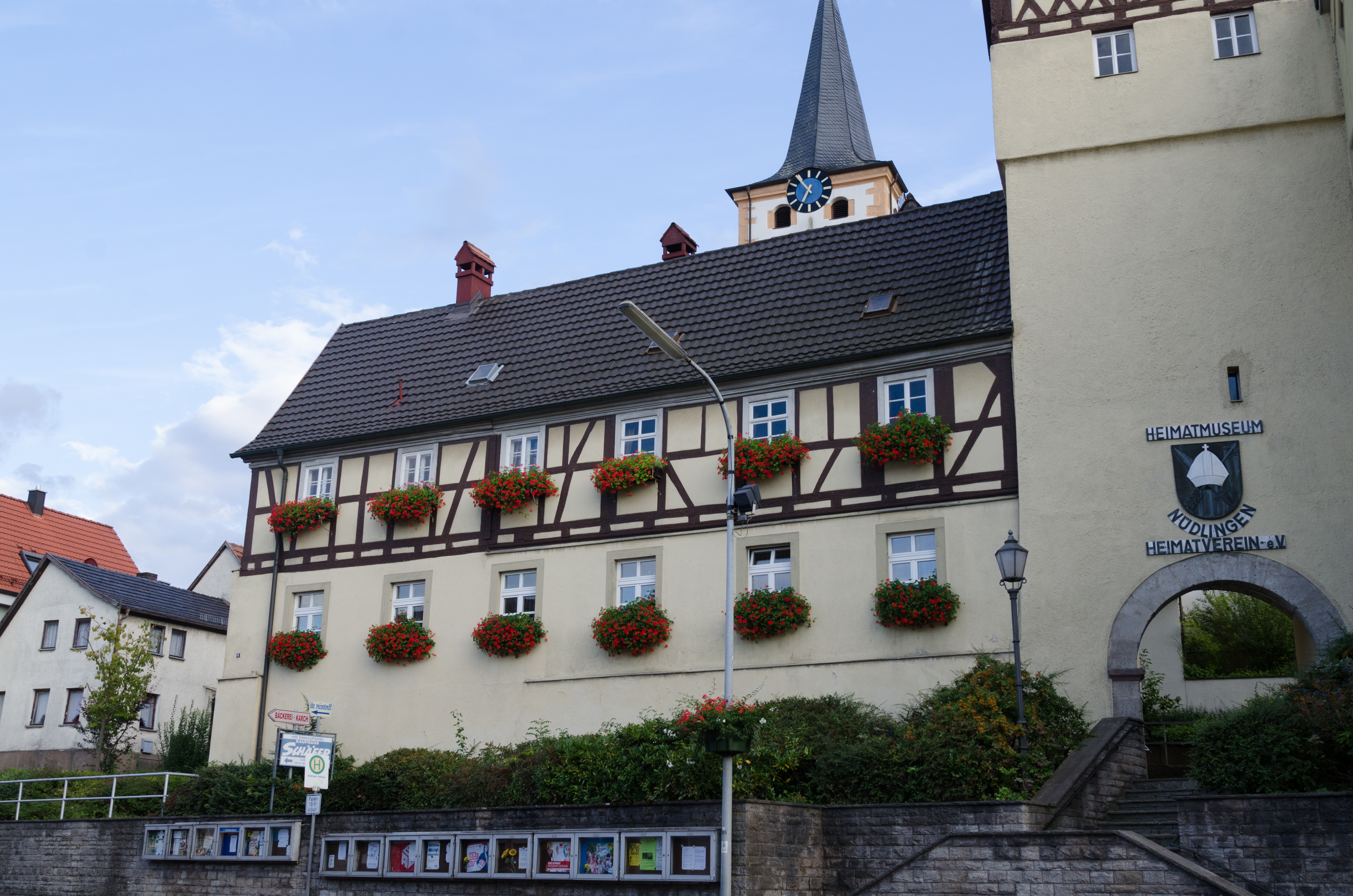 Nüdlingen, Münnerstädter Straße 6